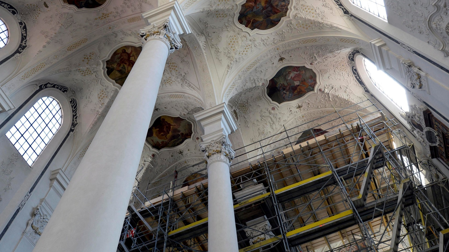 Dominikanerkirche Augsburg während der Sanierung